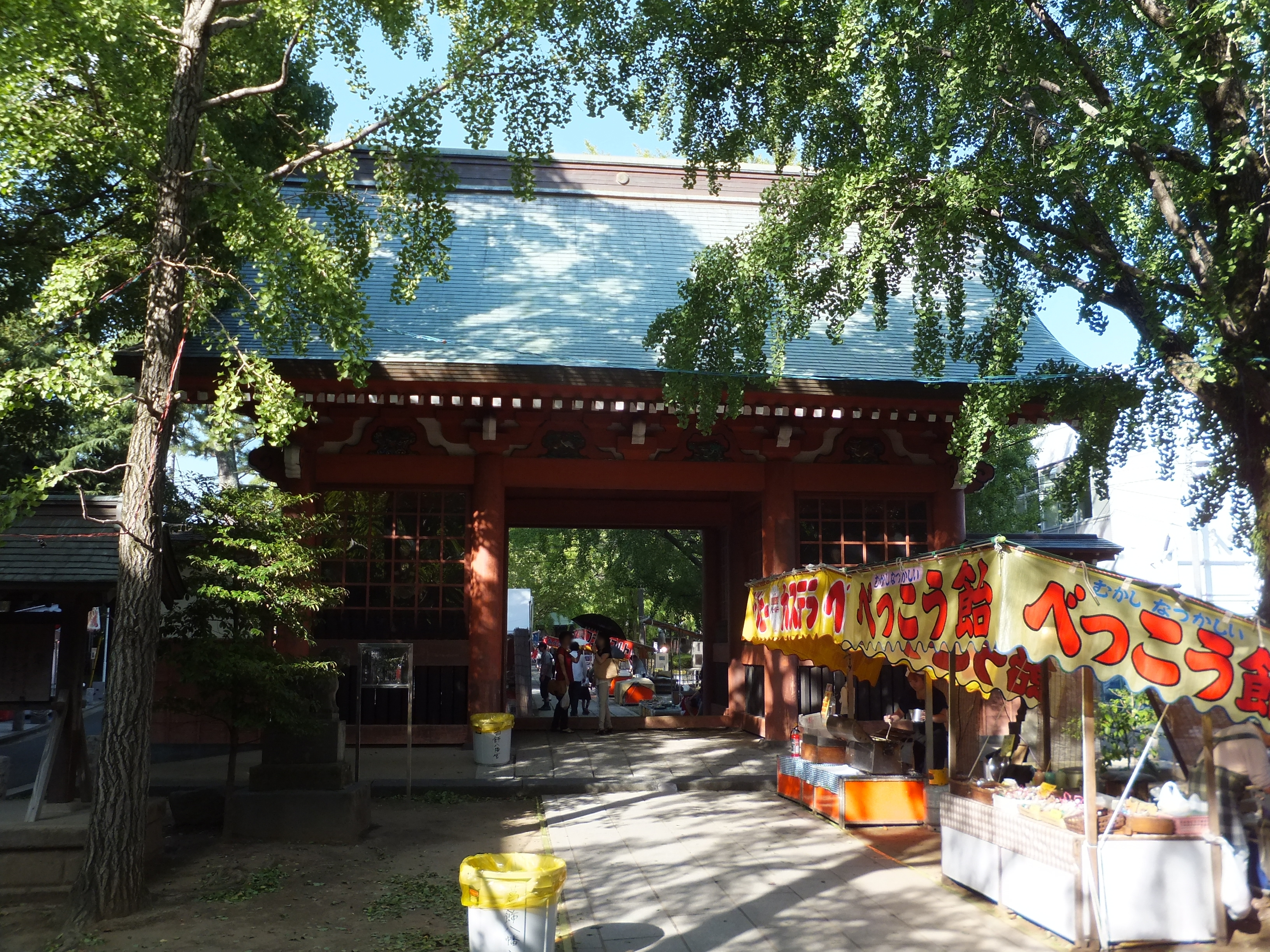 葛飾八幡宮（千葉県市川市）、随神門